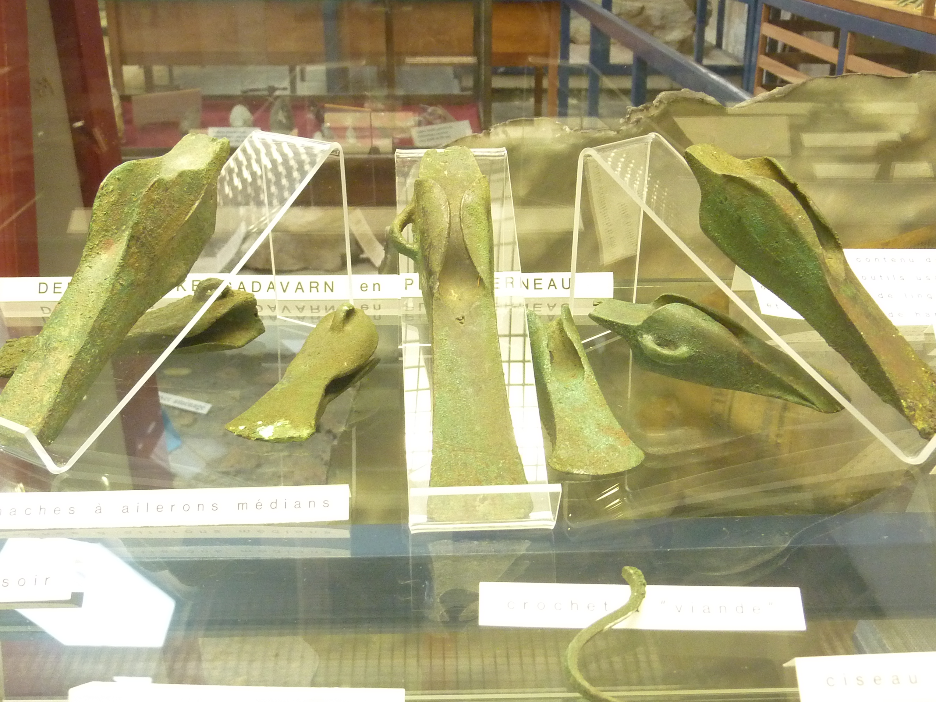 Haches à ailerons datant de la fin de l'âge du bronze, trouvées dans le dépôt de Kergadavarn en Plouguerneau (Musée de la préhistoire finistérienne de Penmarc'h)